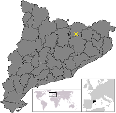 Localització de Ripoll. Location of Ripoll in Catalonia.